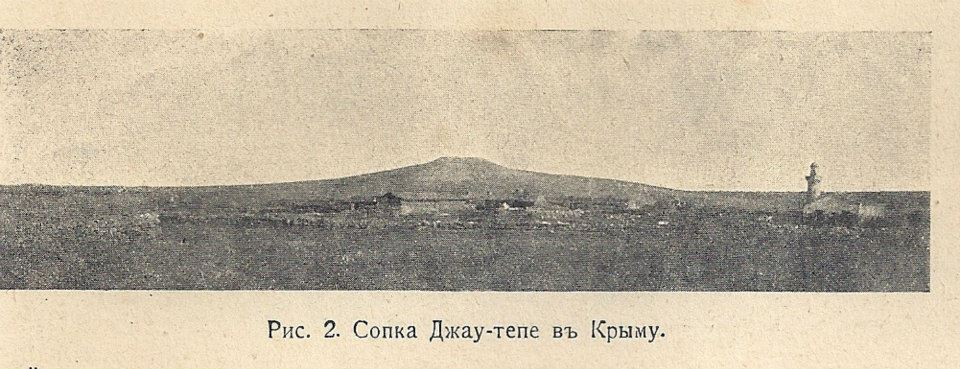 Сопка Джау-Тепе, Крым, 1913 год.